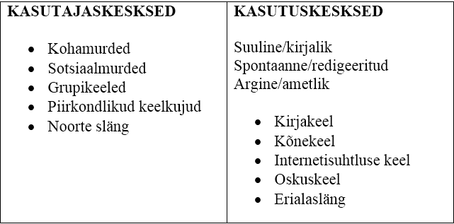 Tabelites on ära jagatud erinevad alkeeled kasutajaskeskseteks ja kasutuskeskseteks allkeeleteks.